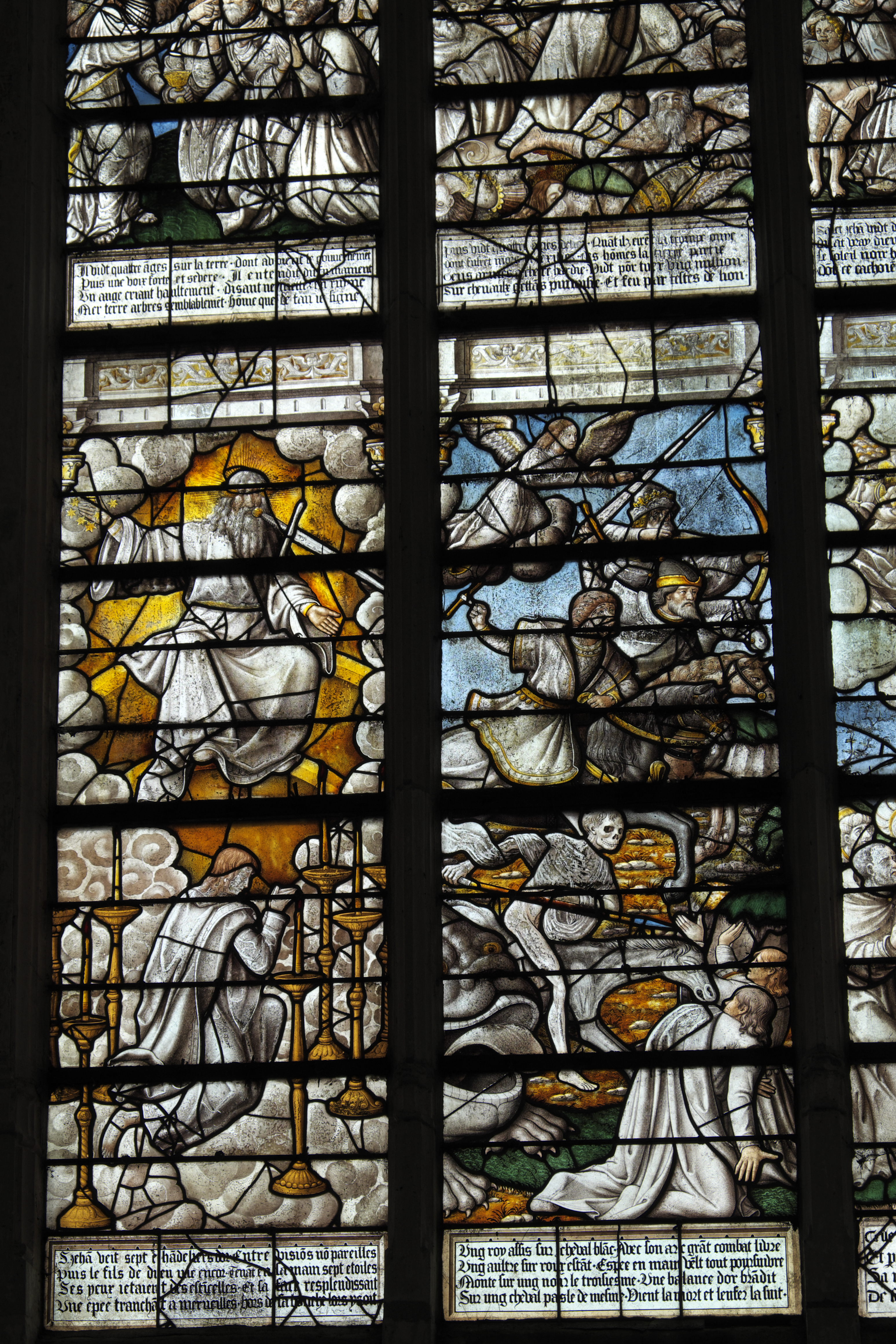 Katholische Kirche Saint-Georges in Chavanges im Département Aube (Champagne-Ardenne/Frankreich), Bleiglasfenster aus dem 16. Jahrhundert, Darstellung: Apokalypse (Ausschnitt).